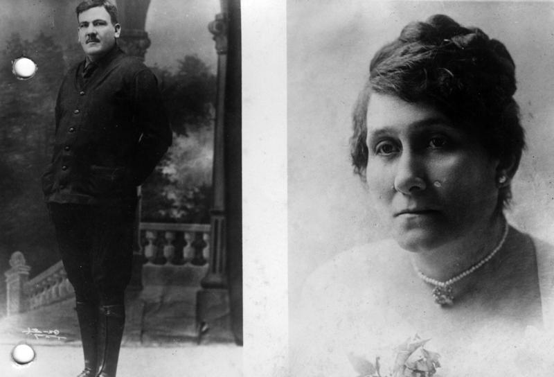 Mexiko. Neueste Aufnahmen des neuernannten Präsidenten Mexikos Calles. Links der Präsident Mexikos Calles in Volkstümlicher Kleidung, rechts seine Gattin, Senora Natalia Calles.